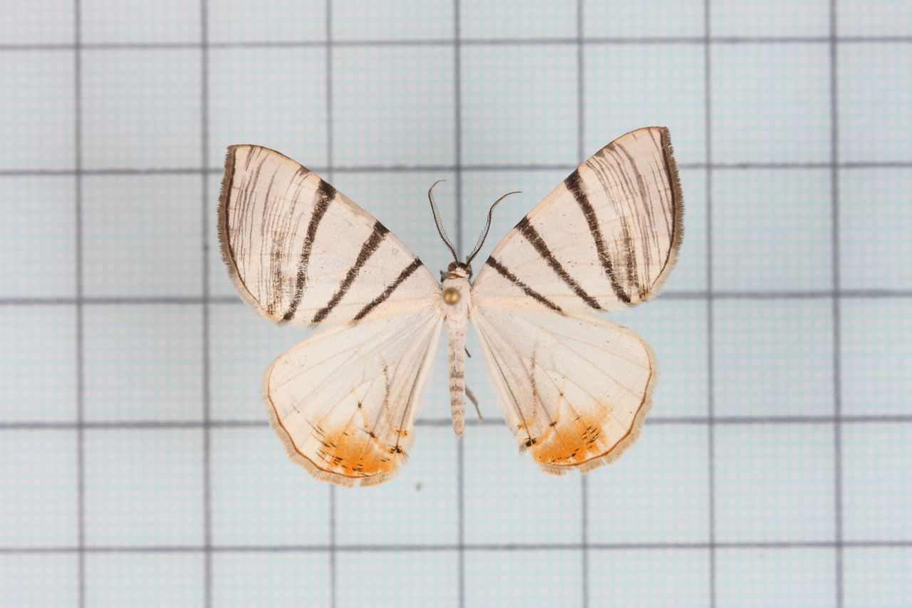 Myrteta angelica (Butler, 1881) 橙尾斜帶尺蛾 臺灣尺蛾科圖鑑 2 P.50 male